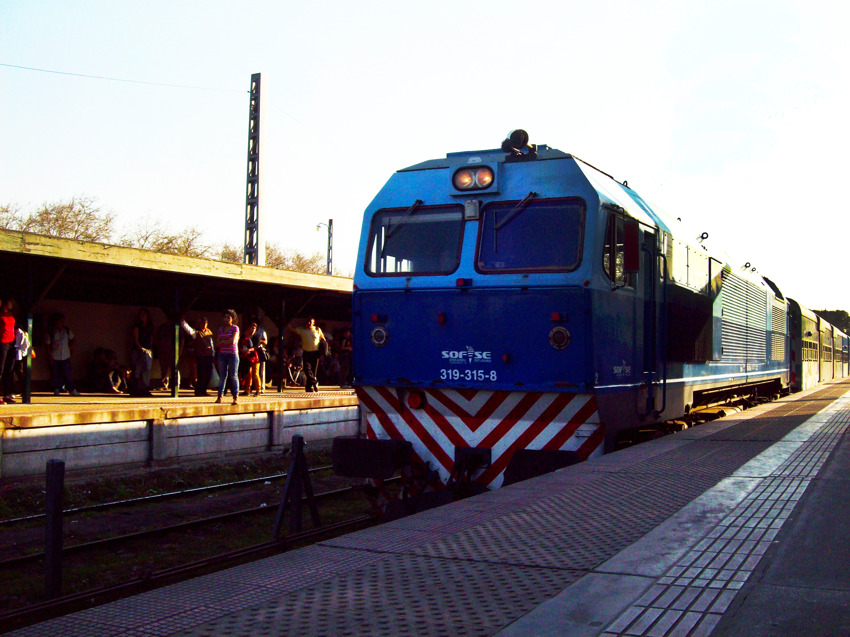 Nueva locomotora diesel que corre por el ramal Gutiérrez-Temperley en estación Bosques, Florencio Varela.